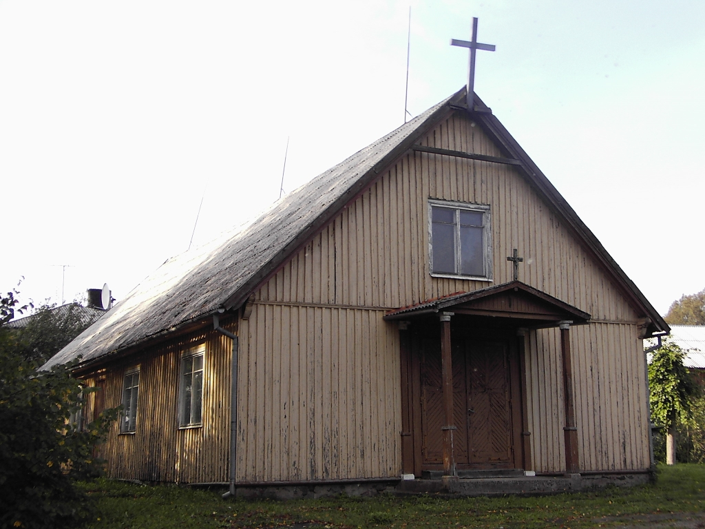 Old church of Šv. Jonas Nepomukas in Grūšlaukė (Kretinga district, Lietuva)